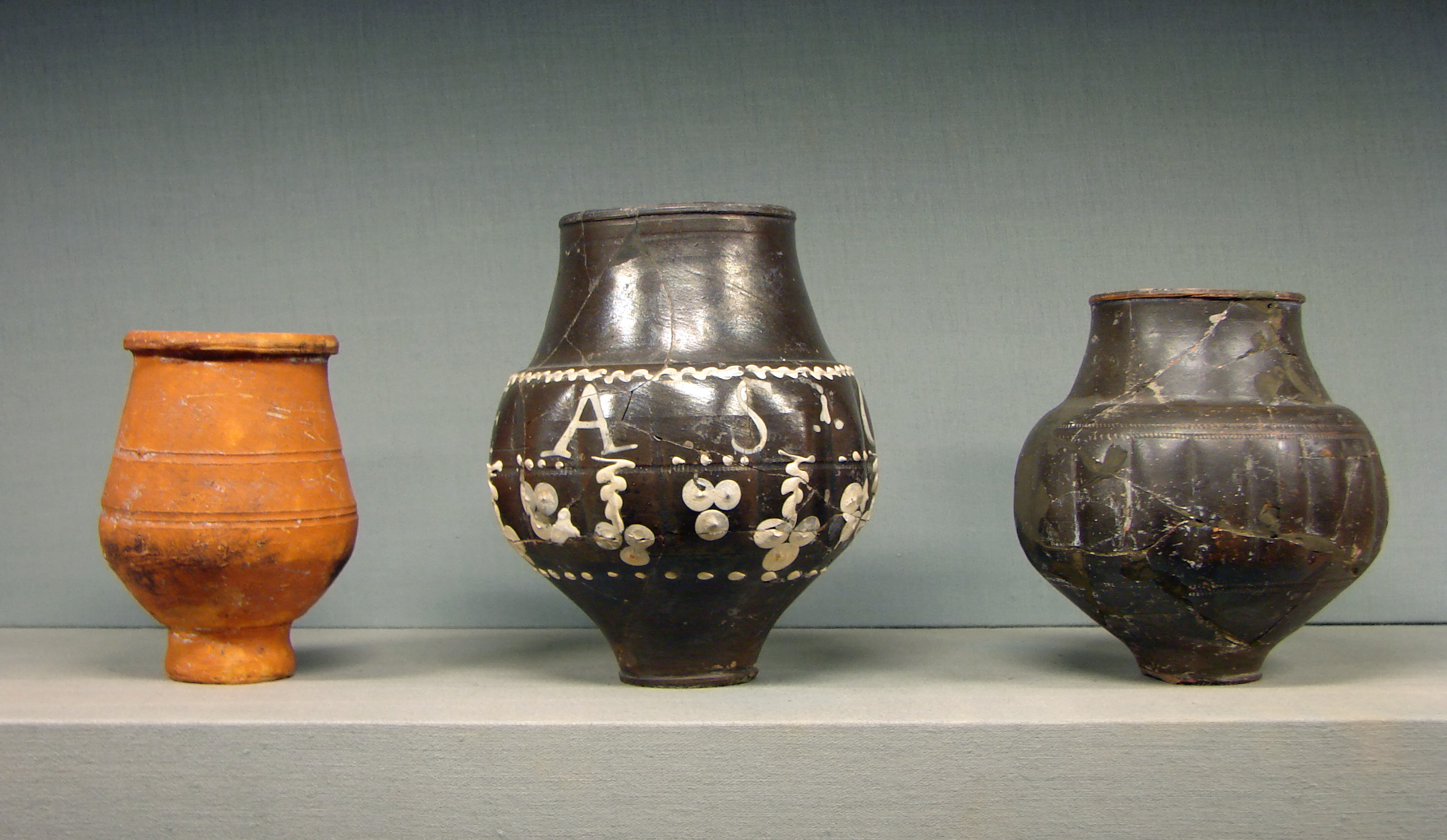 Céramique gallo-romaine, musées de la Cour d'Or à Metz.